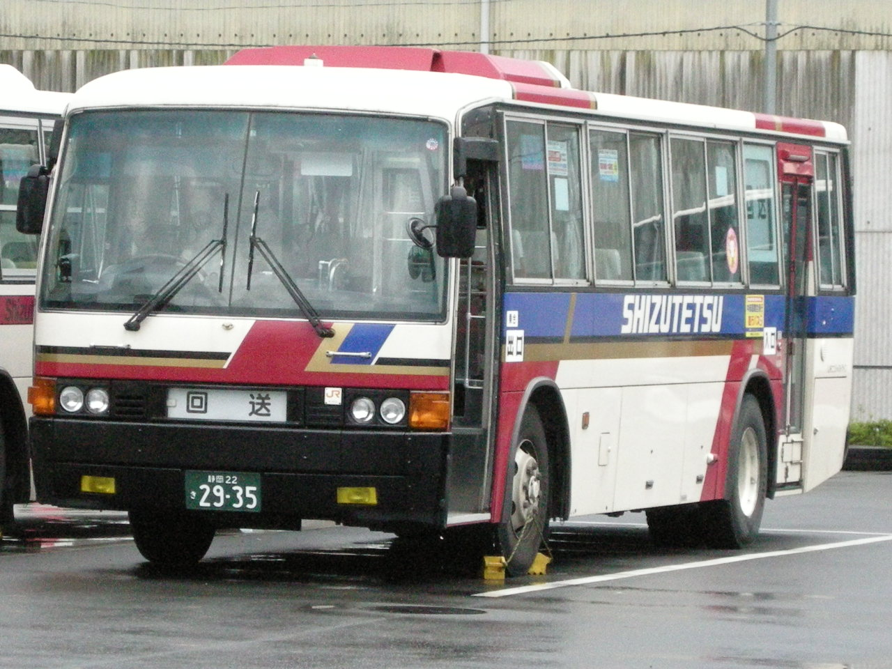 しずてつジャストライン岡部営業所所属の路線・貸切兼用車。三菱U-MP618M